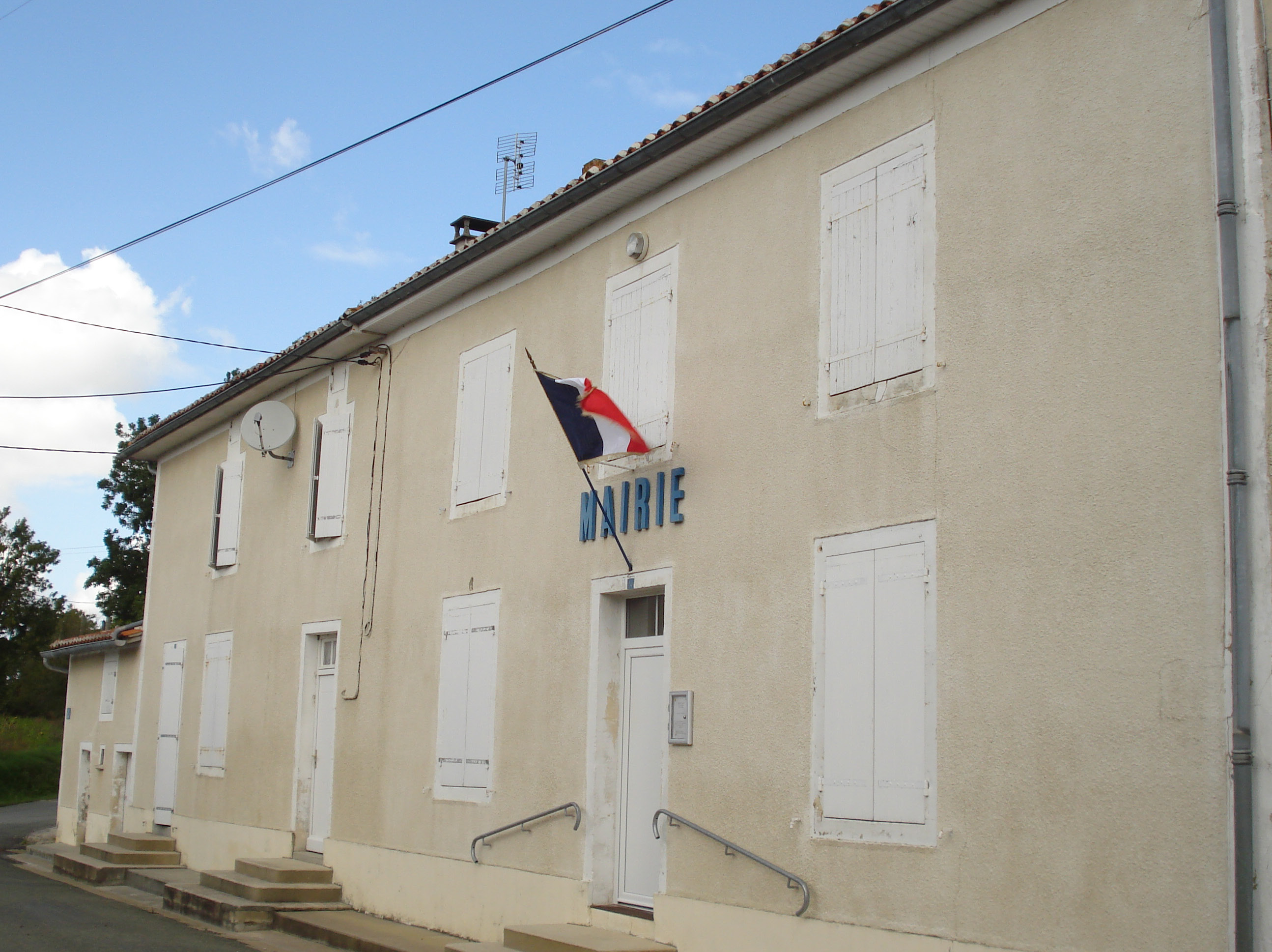 La mairie de Seigné